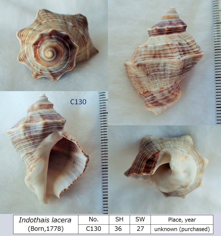 購入品のため、産地は不明。